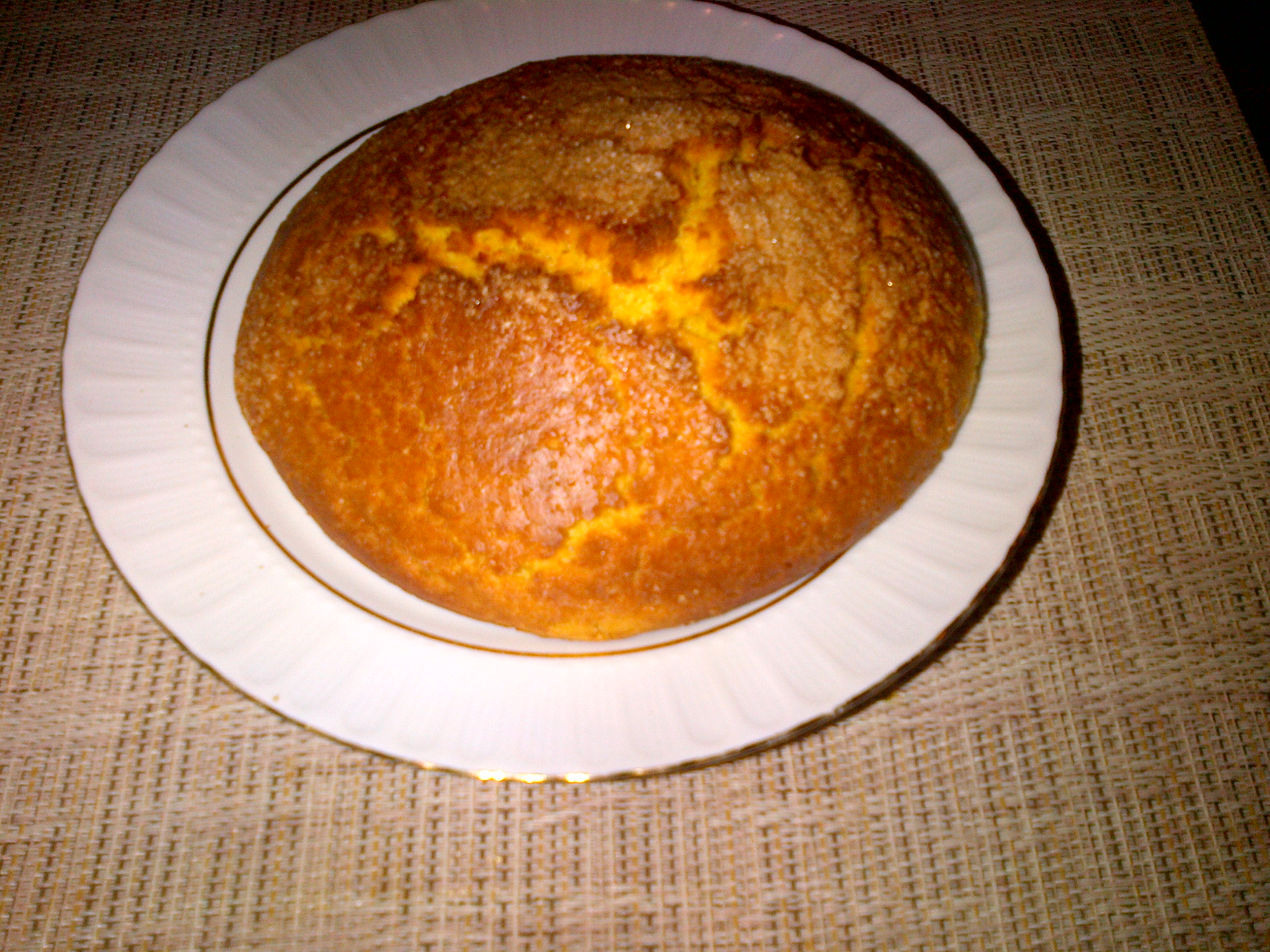 Un çörek es un bollo (casi siempre dulce) turco.